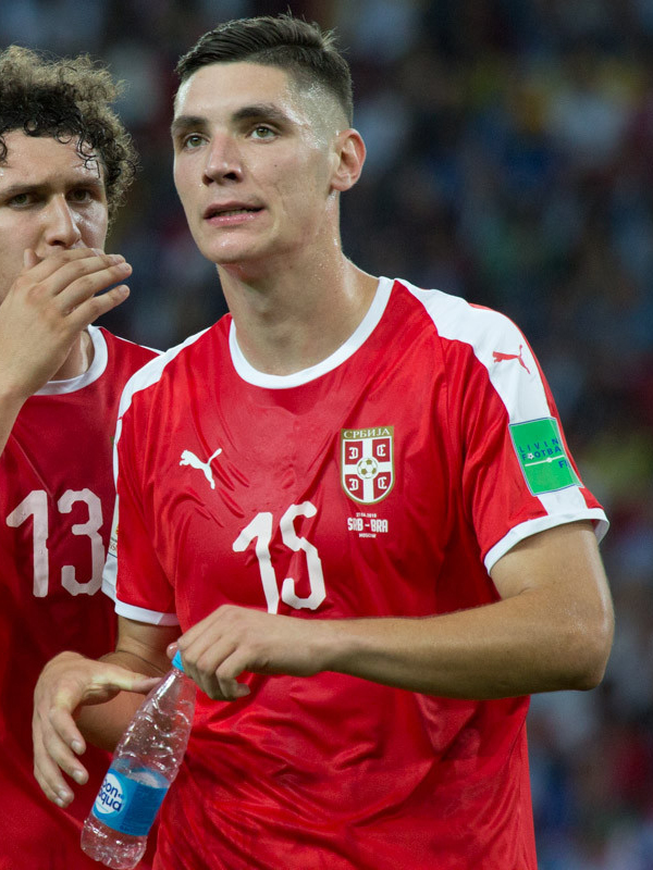 Сборная Бразилии оставляет Сербию за бортом ЧМ-2018 и выходит в плей-офф